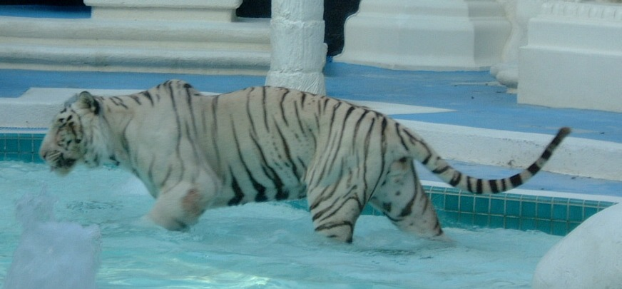 拉斯维加斯动物园的白虎，自制。GNU自由文档许可证下发布。